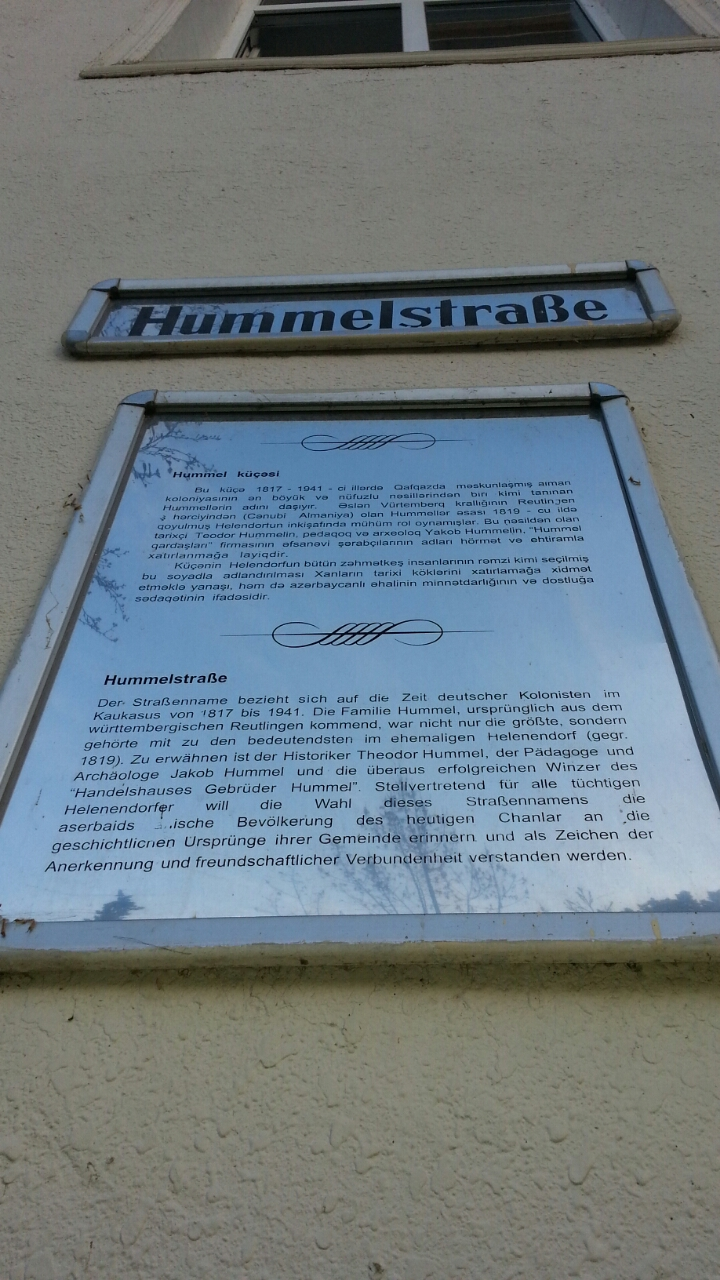 Hummelstraße in Göygöl (ehemalige deutsche Kolonie Helenendorf)